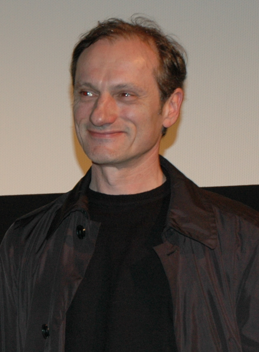 Götz Spielmann at the Crossing Europe Film Festival in Linz, Austria